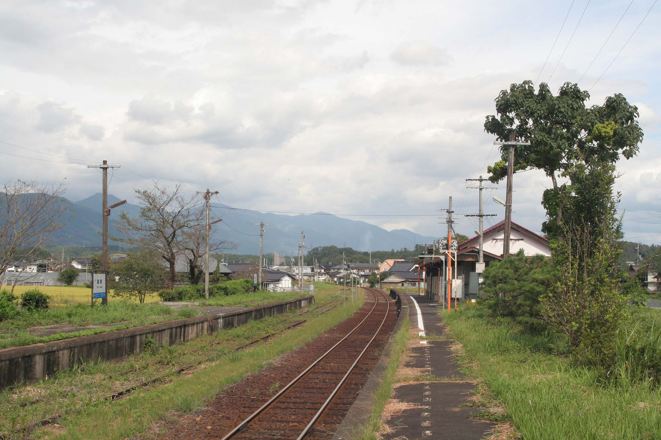 西日本旅客鉄道 高野駅の構内